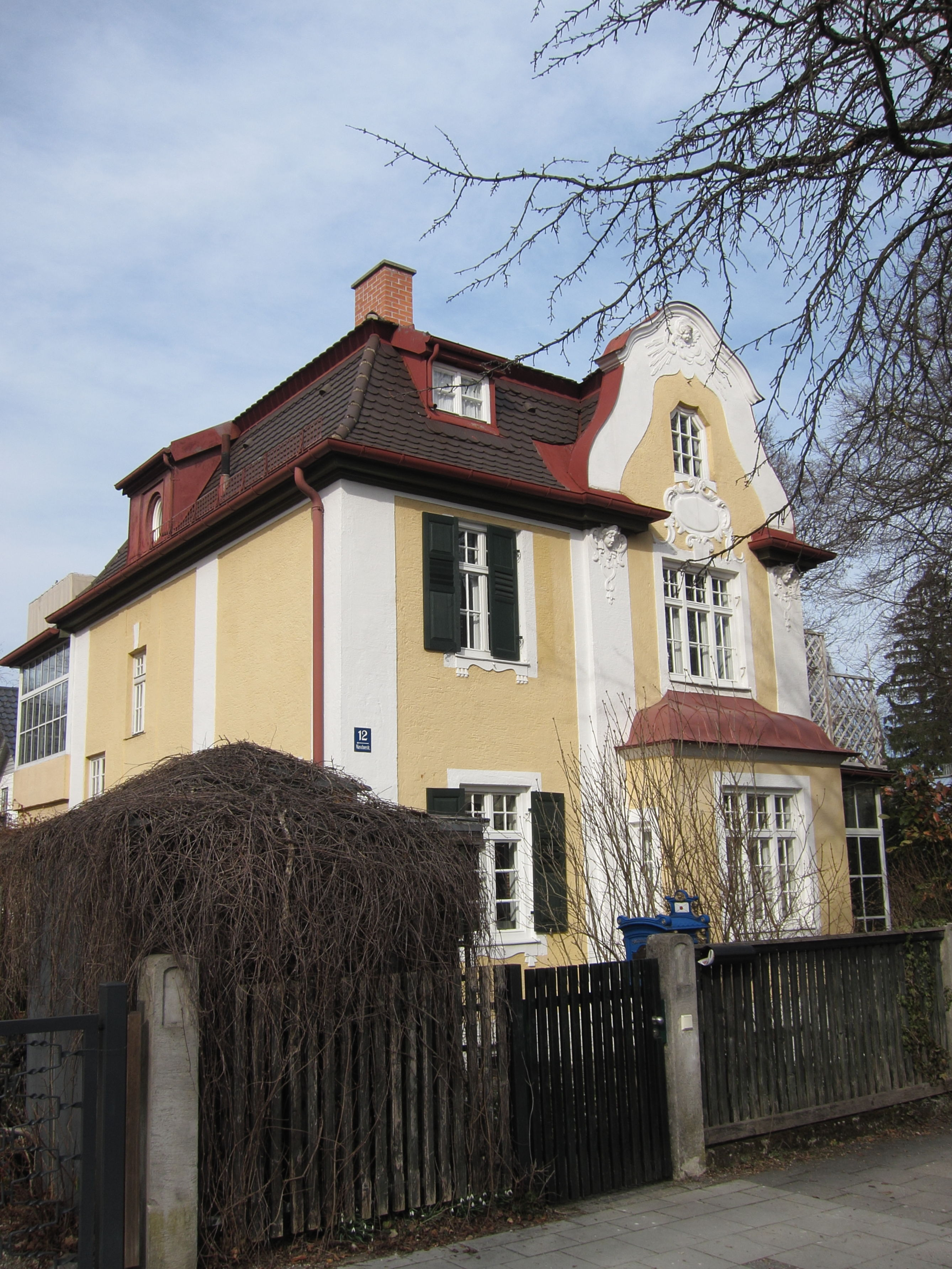 Marschnerstraße 12; Villa, mit Mansarddach und Neurokoko-Dekor, 1901 von Otto Numberger.